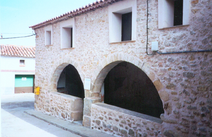 Fotografía Comarca del Jiloca. Antiguo Ayuntamiento de Fonfría.